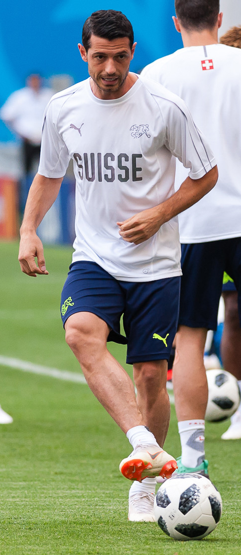 Бразилия и Швейцария готовятся к очной встрече на «Ростов Арене»